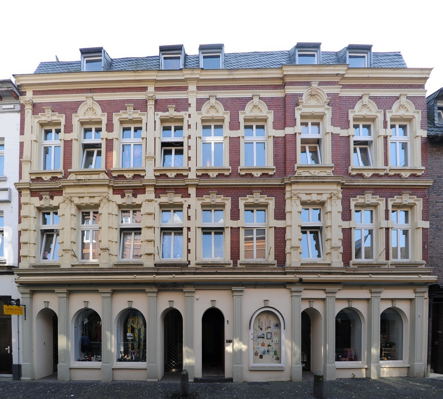 Kevelaer, Maasstraße 1